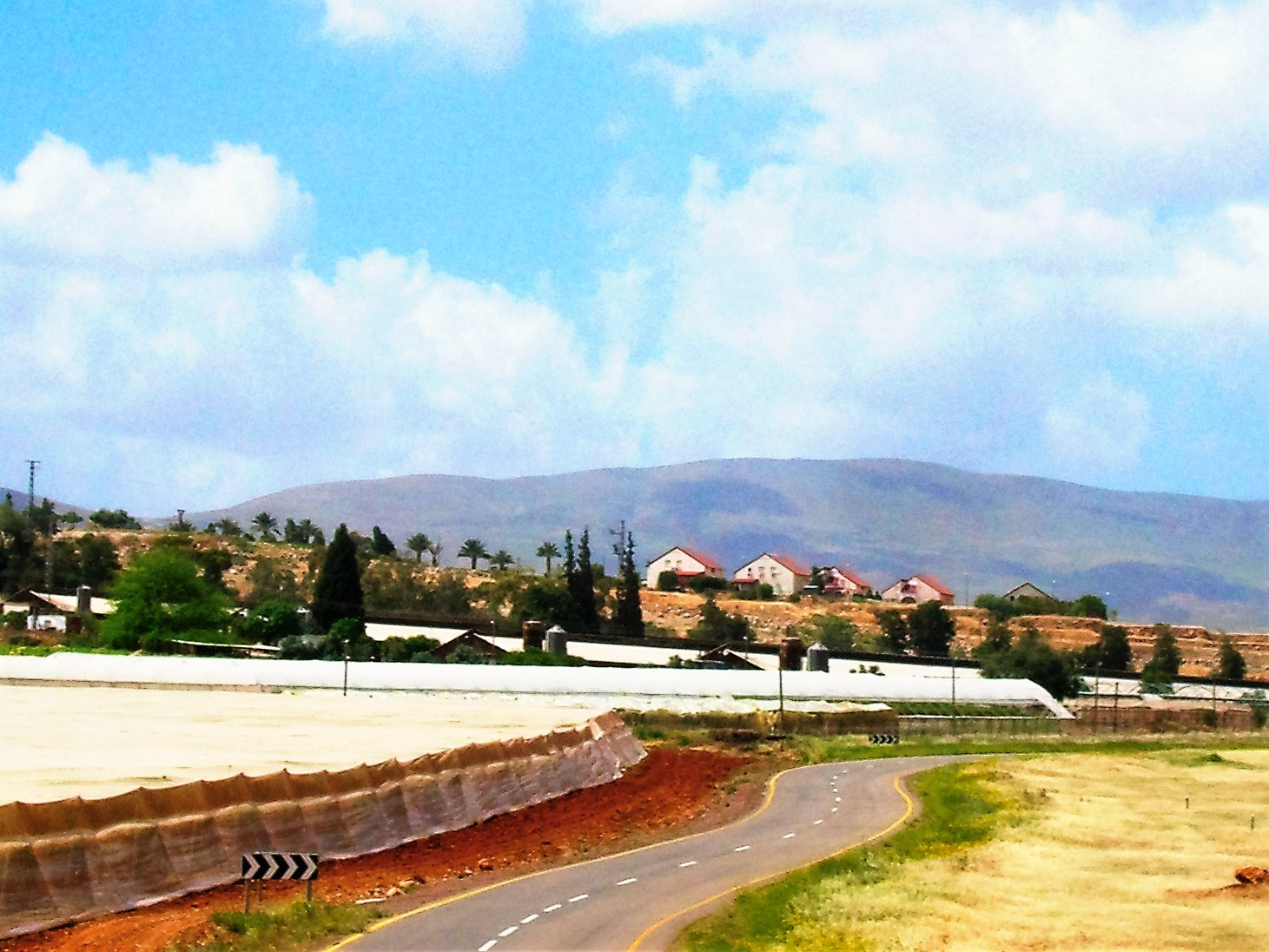 מושב בקעות